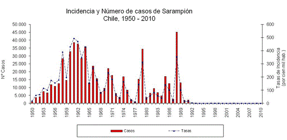 Incidencia y Número de casos de Sarampión en Chile 1950-2010